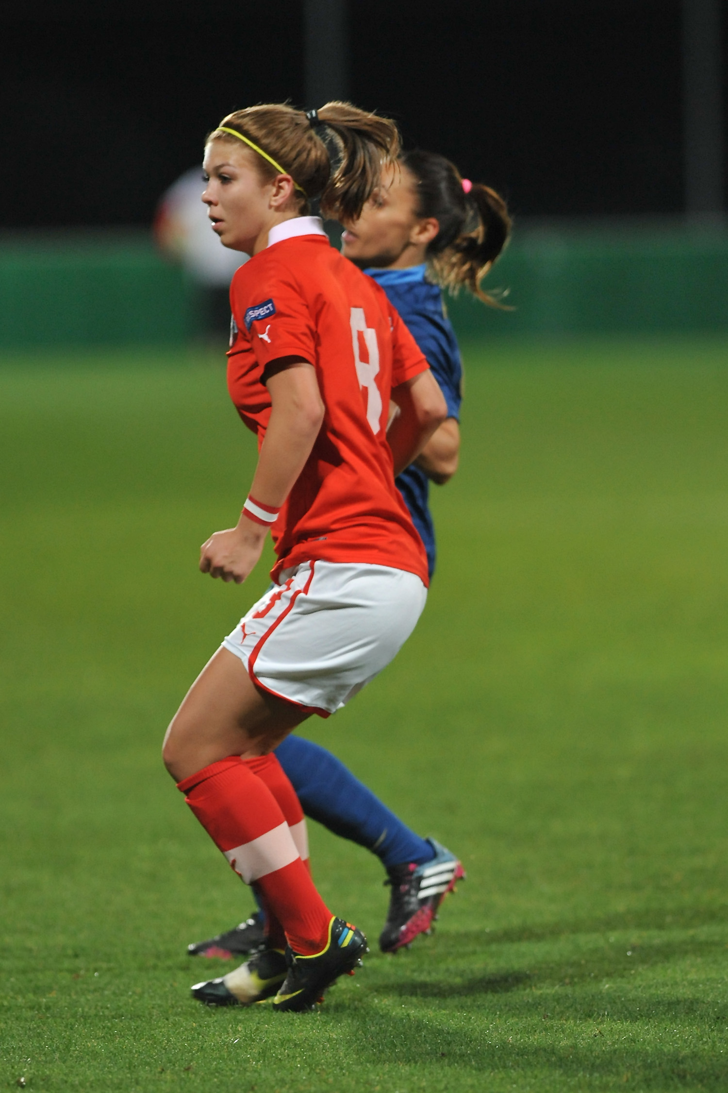 FIFA Women's World Cup 2015 Qualiying Round Österreich - Frankreich am 31. Oktober 2013 in Ritzing: Nadine Prohaska